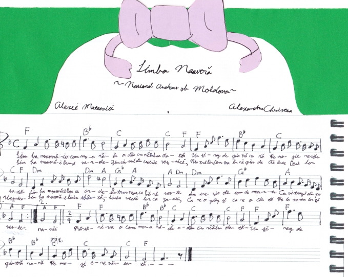 Achun1111y가 손으로 직접 만듬.